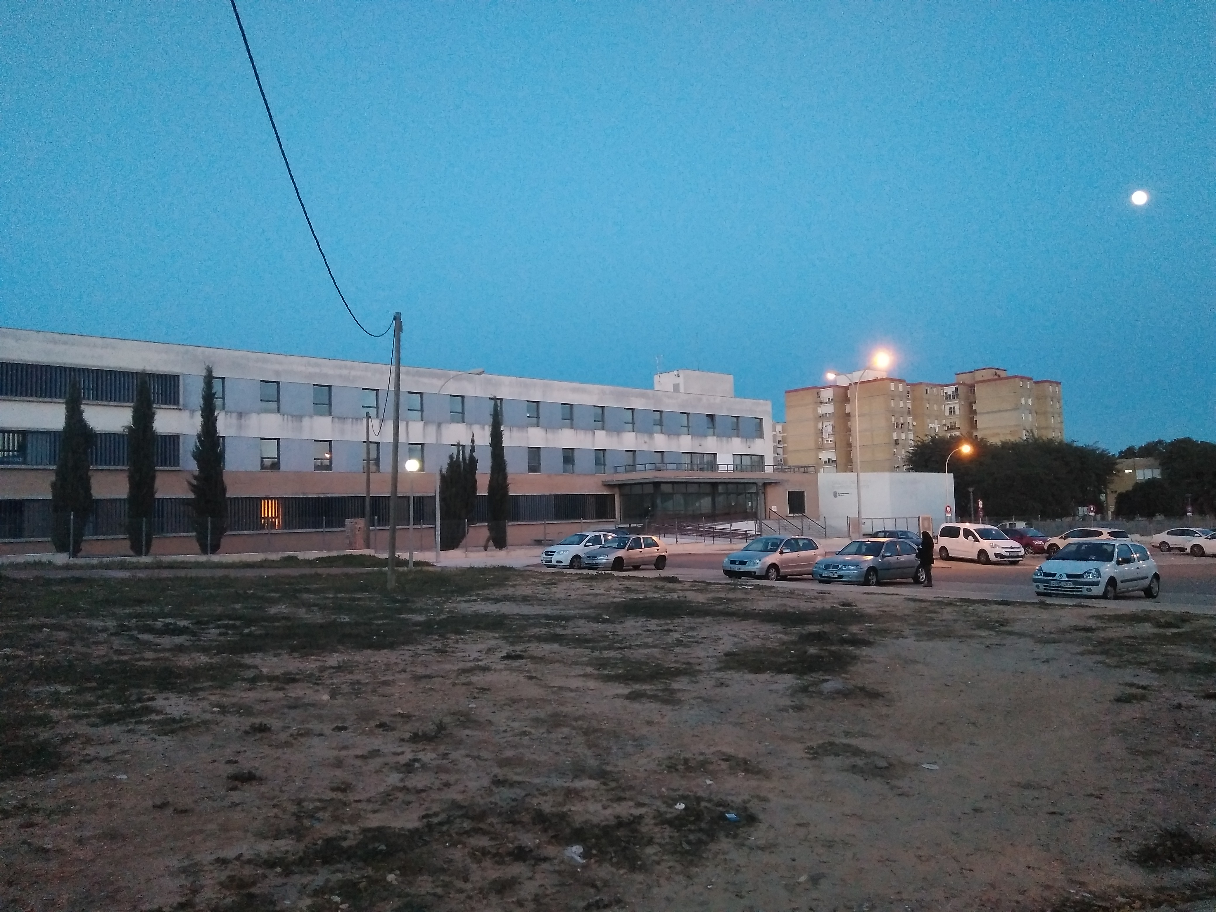 Centro de atención a la ciudadanía del Distrito Oeste de Jerez de la Frontera, España